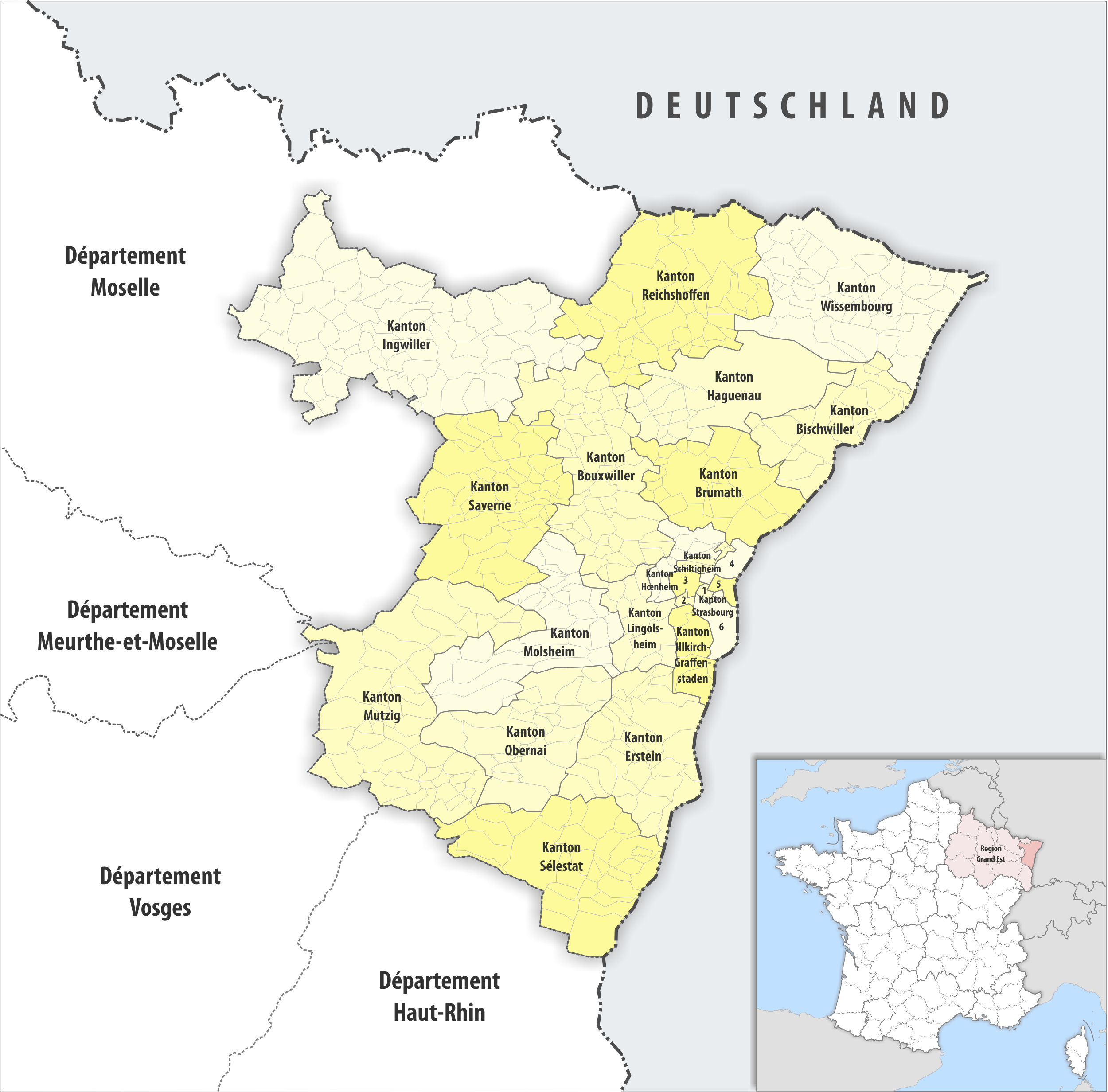 Gemeinden und Kantone im Departement Bas-Rhin